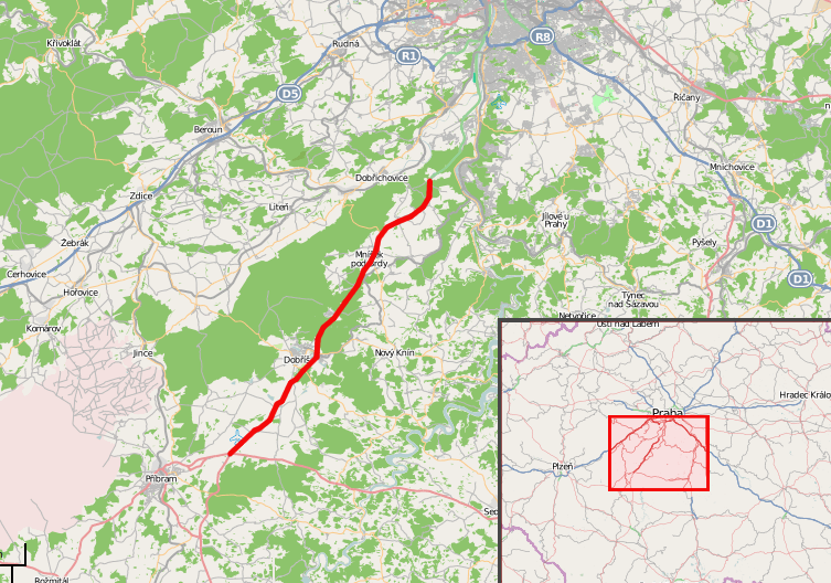 Mapa rychlostní silnice R4